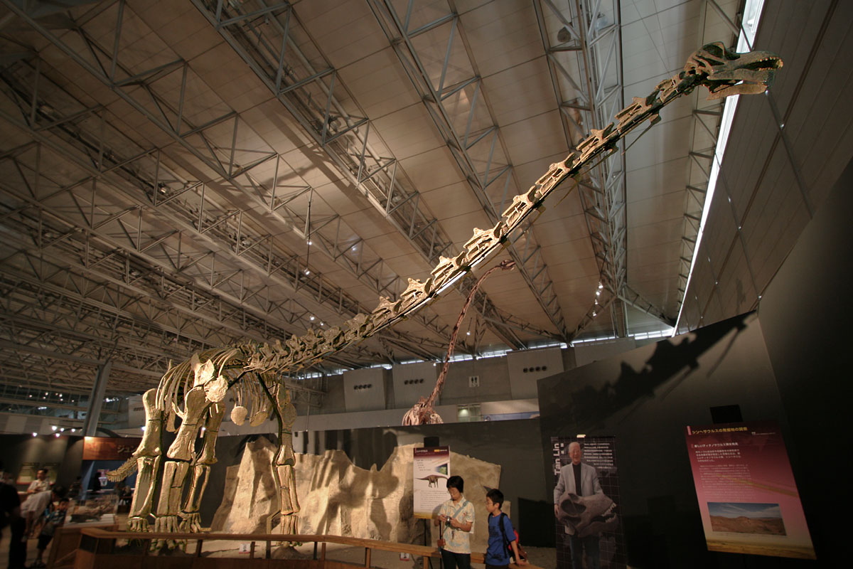 Xinghesaurus